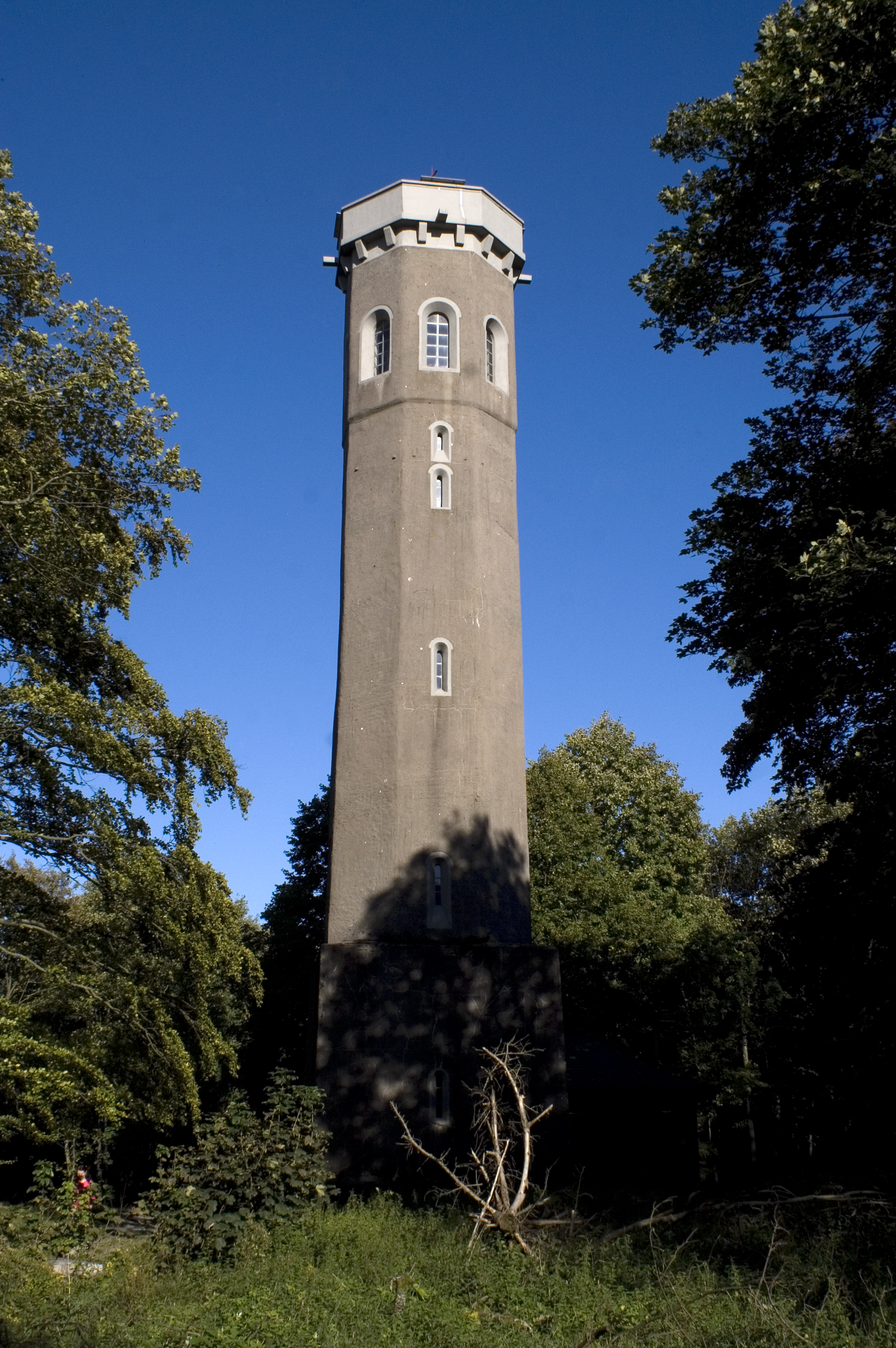 auf dem Donnersbergplateau: Ludwigsturm; zinnenkranzberkönter achteckiger Putzbau, bezeichnet 1864 und 1953 (Erneuerung), Architekt Carl Bleßmann, Kirchheimbolanden, und die könligliche Kreisbaubehörde, Speyer